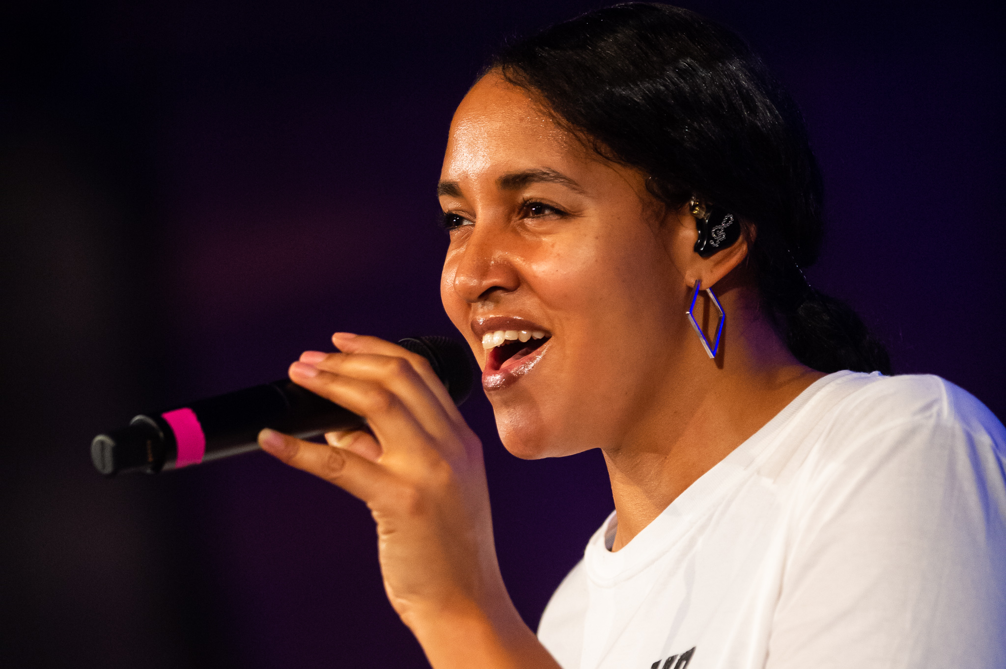 Cassandra Steen,Concertbüro Franken,Glashaus,Konzert,Livekonzert,Livemusik,Markgrafensaal,Musik